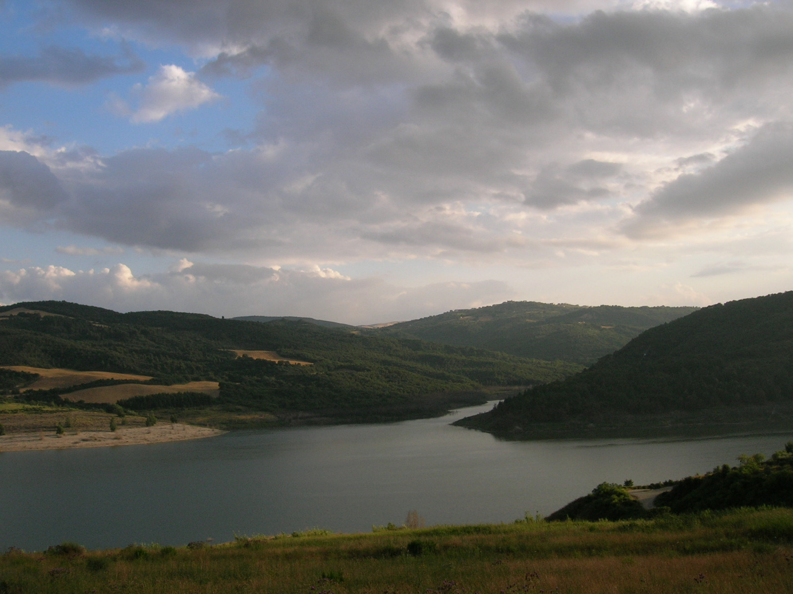 Lago di Acerenza visto dal casino Il Maglio